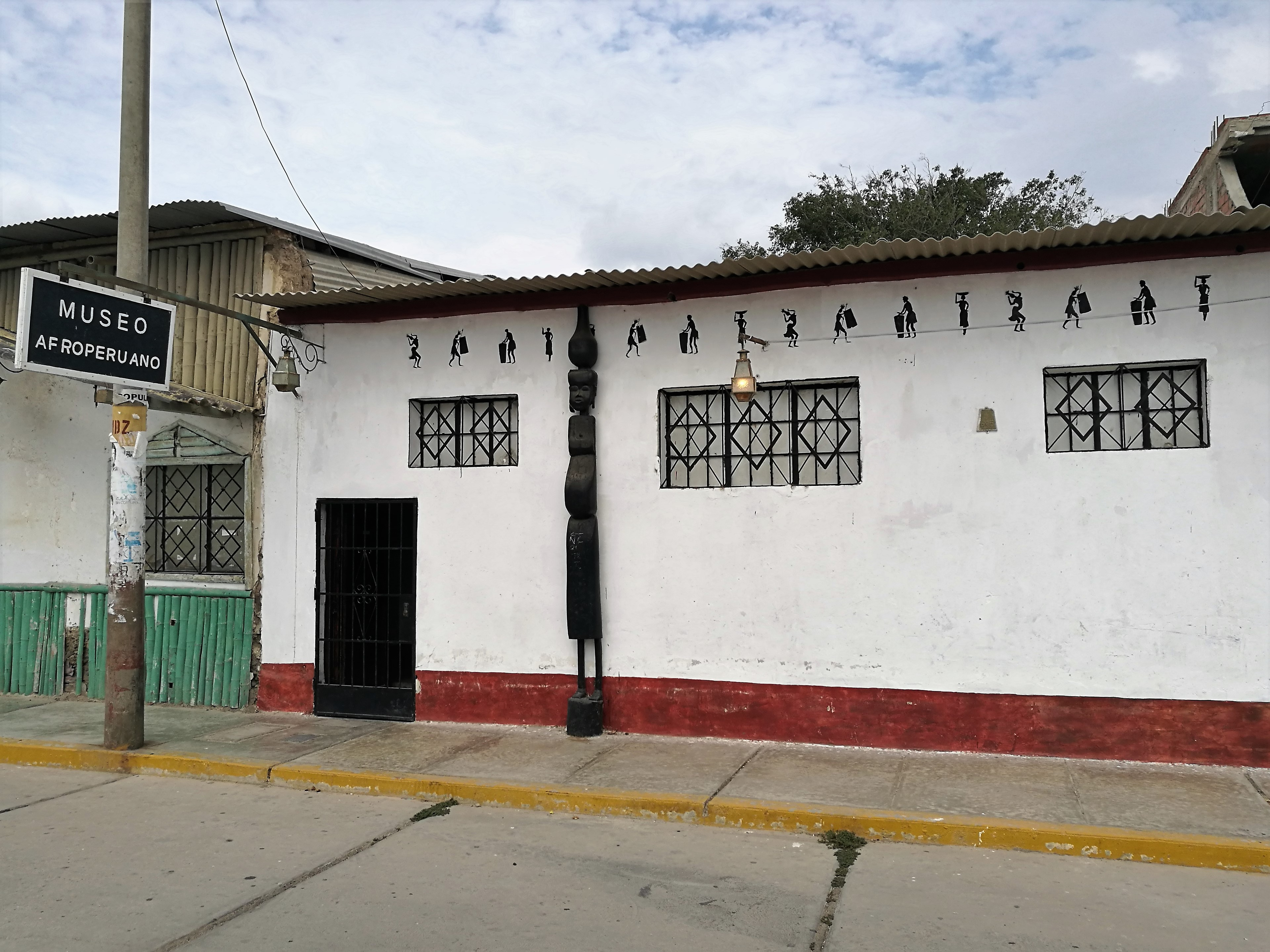 façana del Museo Afroperuano de Zaña al jirón Independencia